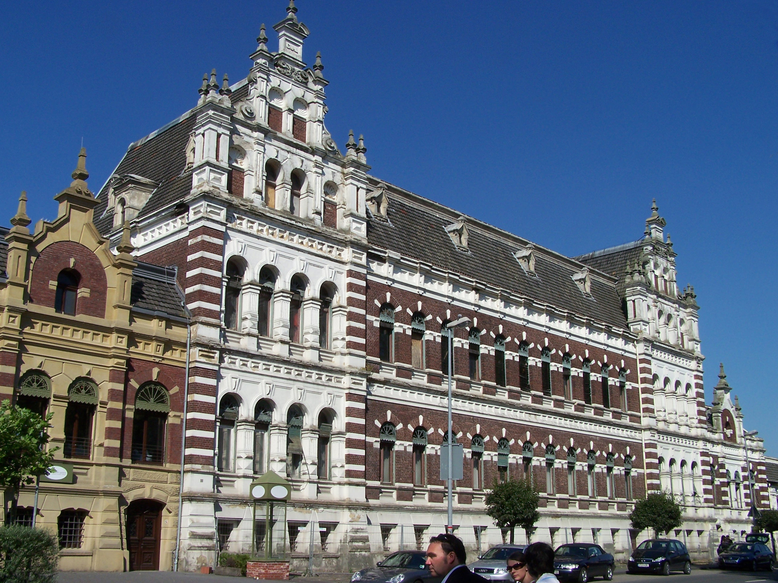 Beltmann-Bau, ehemaliges Verwaltungsgebäude der Textilwerke Gebr. Laurenz in Ochtrup, Kreis Steinfurt, Nordrhein-Westfalen, Deutschland.